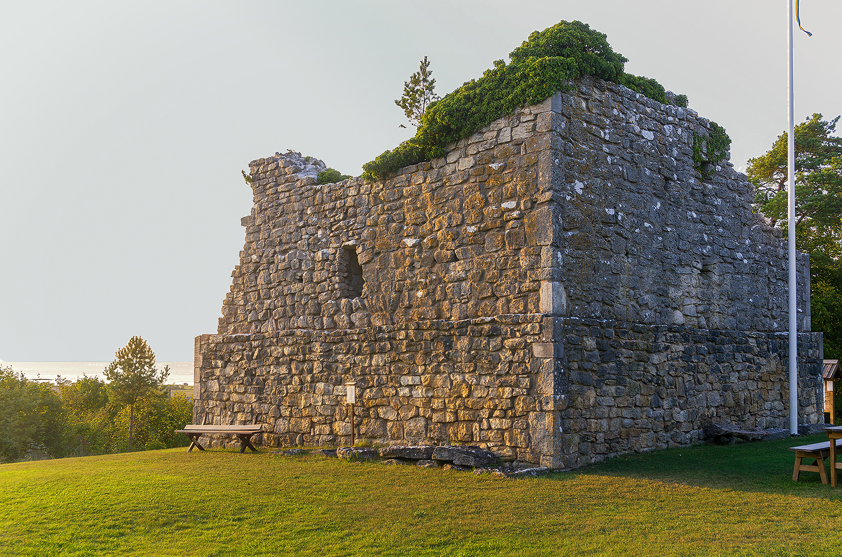 Kastalen är en medeltida befästning. Grova, välbyggda murar 1,7 meter tjocka. Ingångsdörren ligger högt, (mitt på bild). Mot väster finns endast grunden kvar. Utsikt mot hamnen som fanns här förr och mot havet och Karlsöarna.